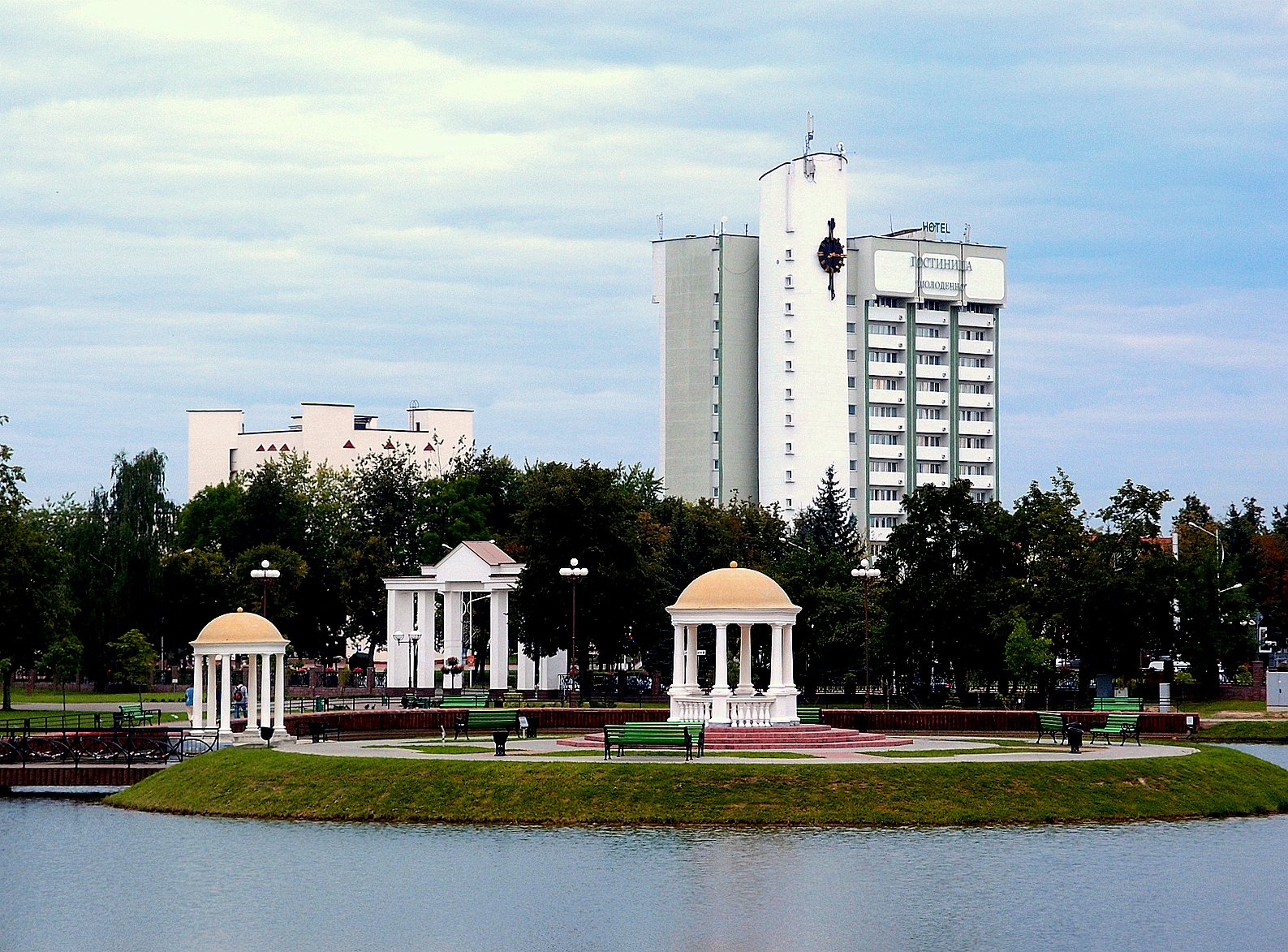 Park in Maladziečna, Belarus.